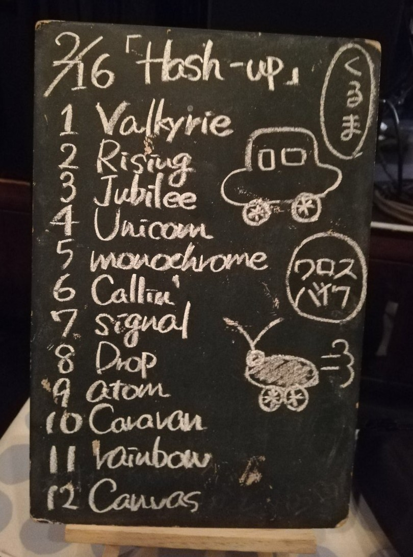 amiinAセトリボード